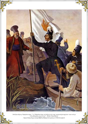 Αλέξανδρος Υψηλάντης, «ο Υψηλάντης αναδέχεται την αρχιστρατηγίαν του υπερ ελευθερίας αγώνος».